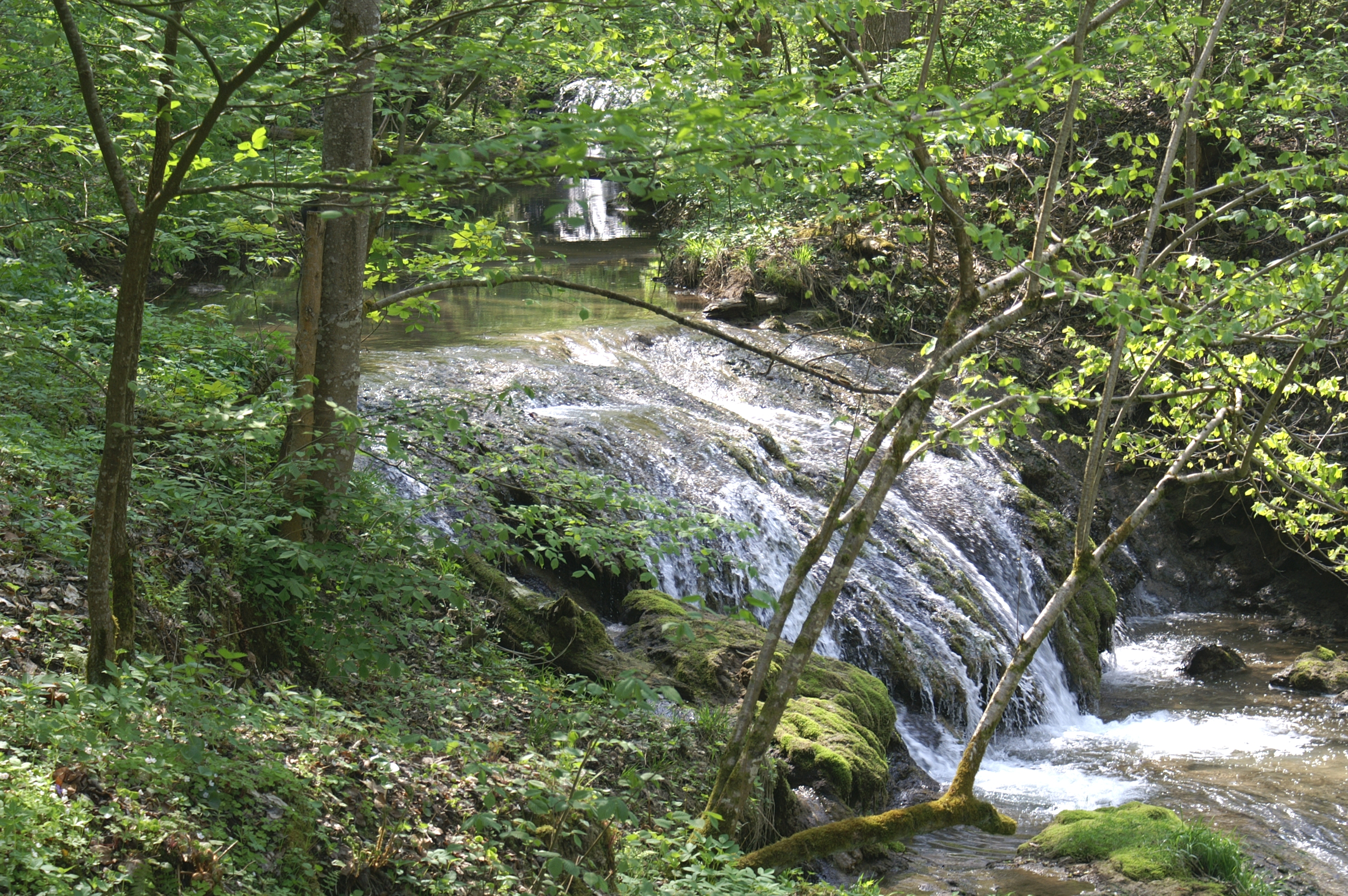 Große Lauter, einer der beiden Wasserfälle mit zwei Fallstufen über Kalktuff, mittlere Schwäbische Alb.